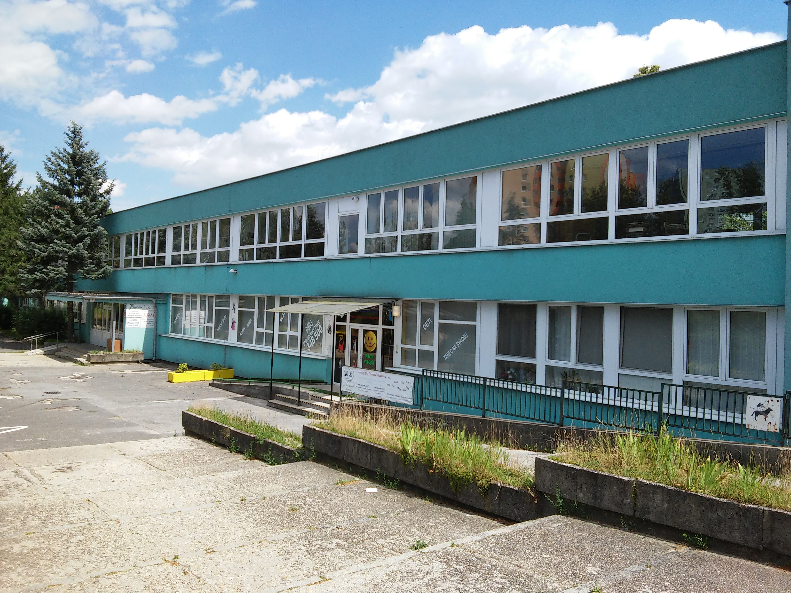 Batkova 2, Dúbravka, Bratislava